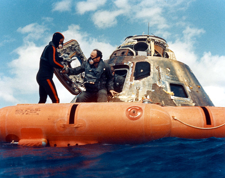 A navy diver helps Ed Mitchell into the recovery raft. 9 February 1971.